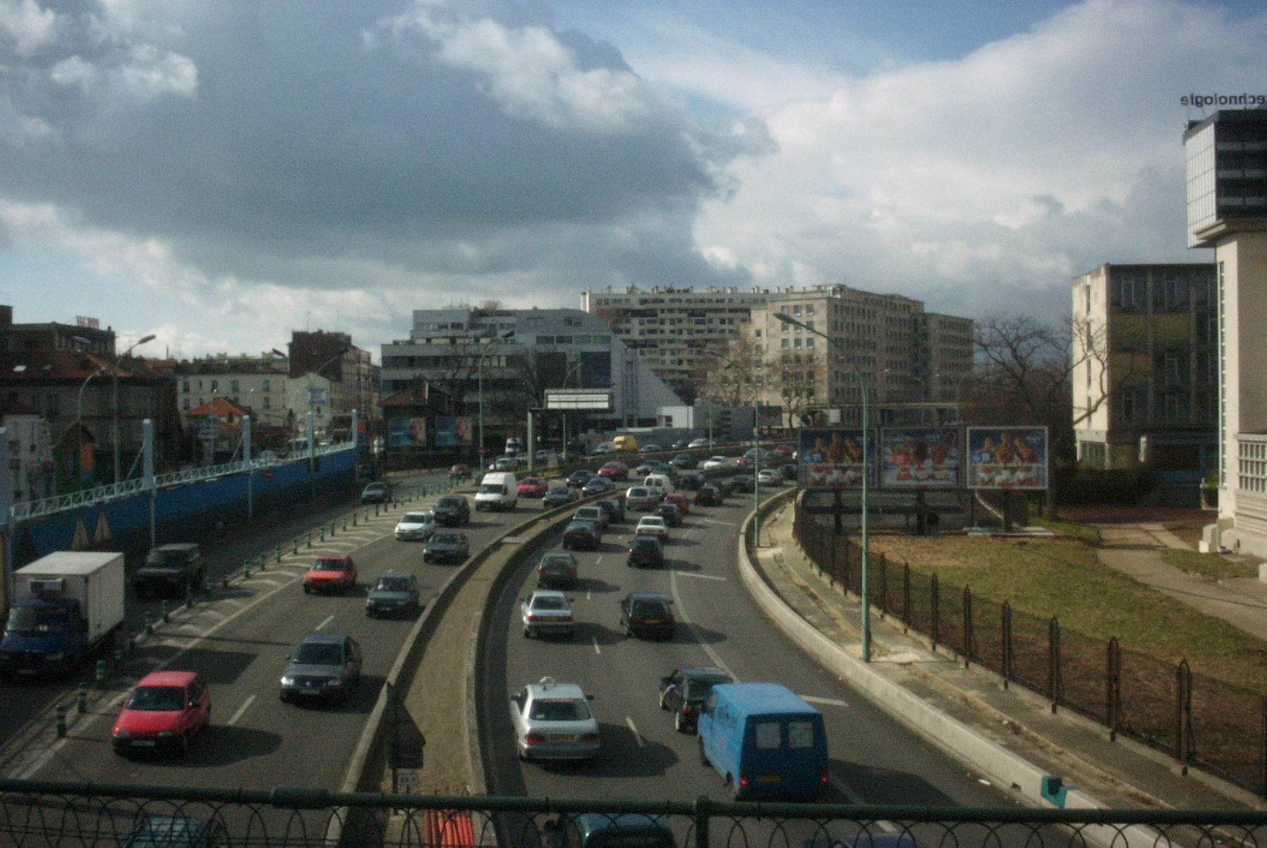 Rondweg van Parijs beter bekend als de peripherique.